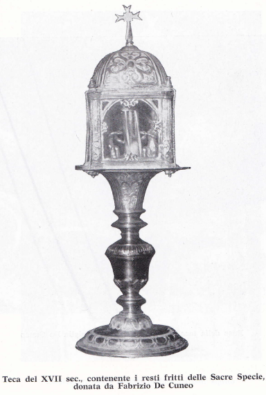 In questa Teca-Reliquiario sono contenuti i Sacri Frammenti di quella che divenne Carne di Cristo. Essa è stata donata dal N.H. Fabrizio De Cuneo nel 1615 alla Cattedrale, grande devoto del Miracolo Eucaristico di Trani.